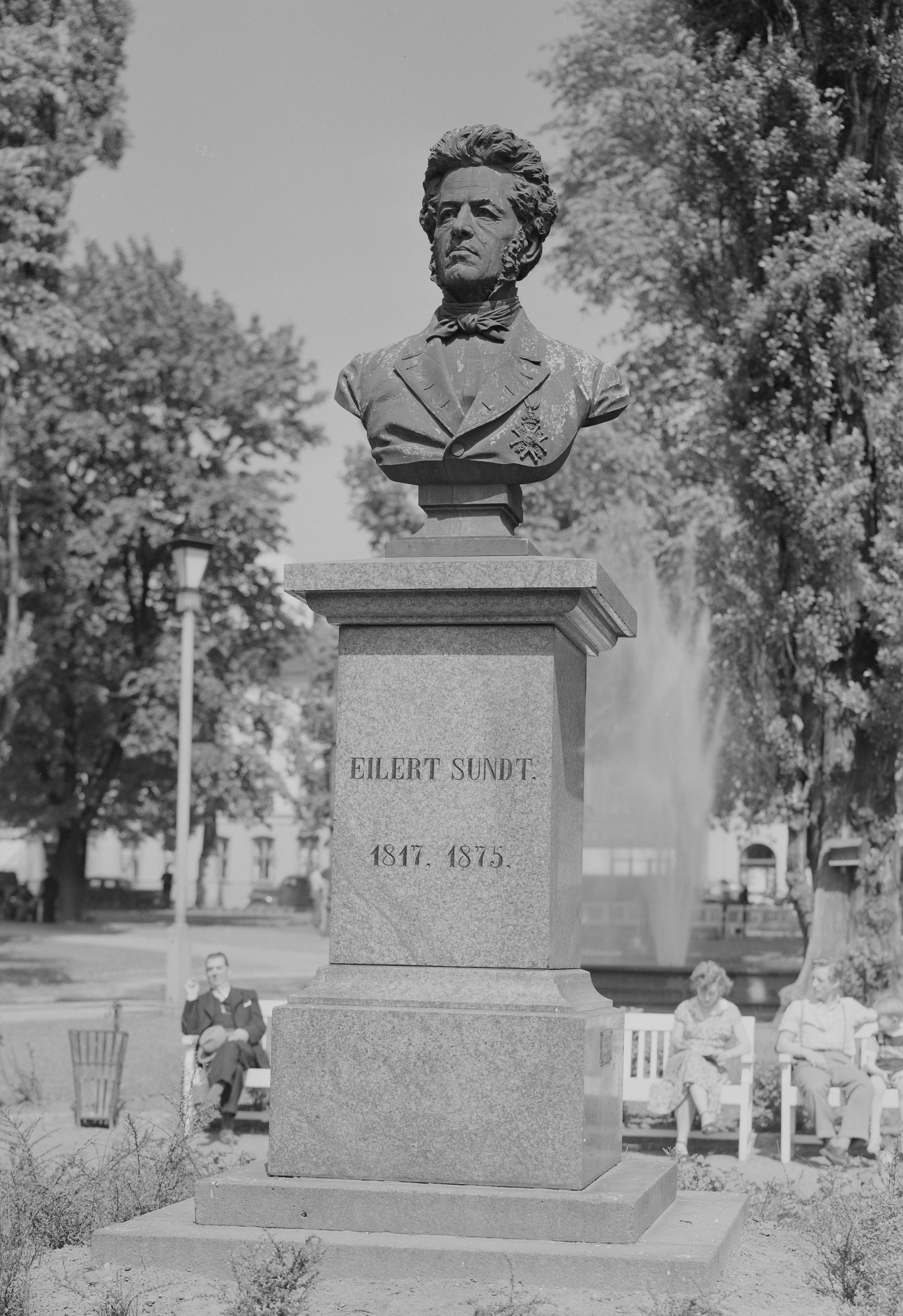 Bildet er hentet fra Nasjonalbibliotekets bildesamling. Anmerkninger til bildet var: Fotograf : ukjent Grünerløkka,Olaf Ryes plass,Oslo, Oslo, Oslo